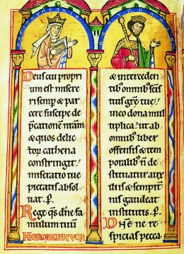 Gertrud von Andechs-Meranien und Andreas II. von Ungarn, Miniatur im Landgrafenpsalter, unbekannter Künstler, ca. zwischen 1211-1213, Projekt: Landesausstellung, Bayern-Ungarn Tausend Jahre, Haus der Bayerischen Geschichte, 2001